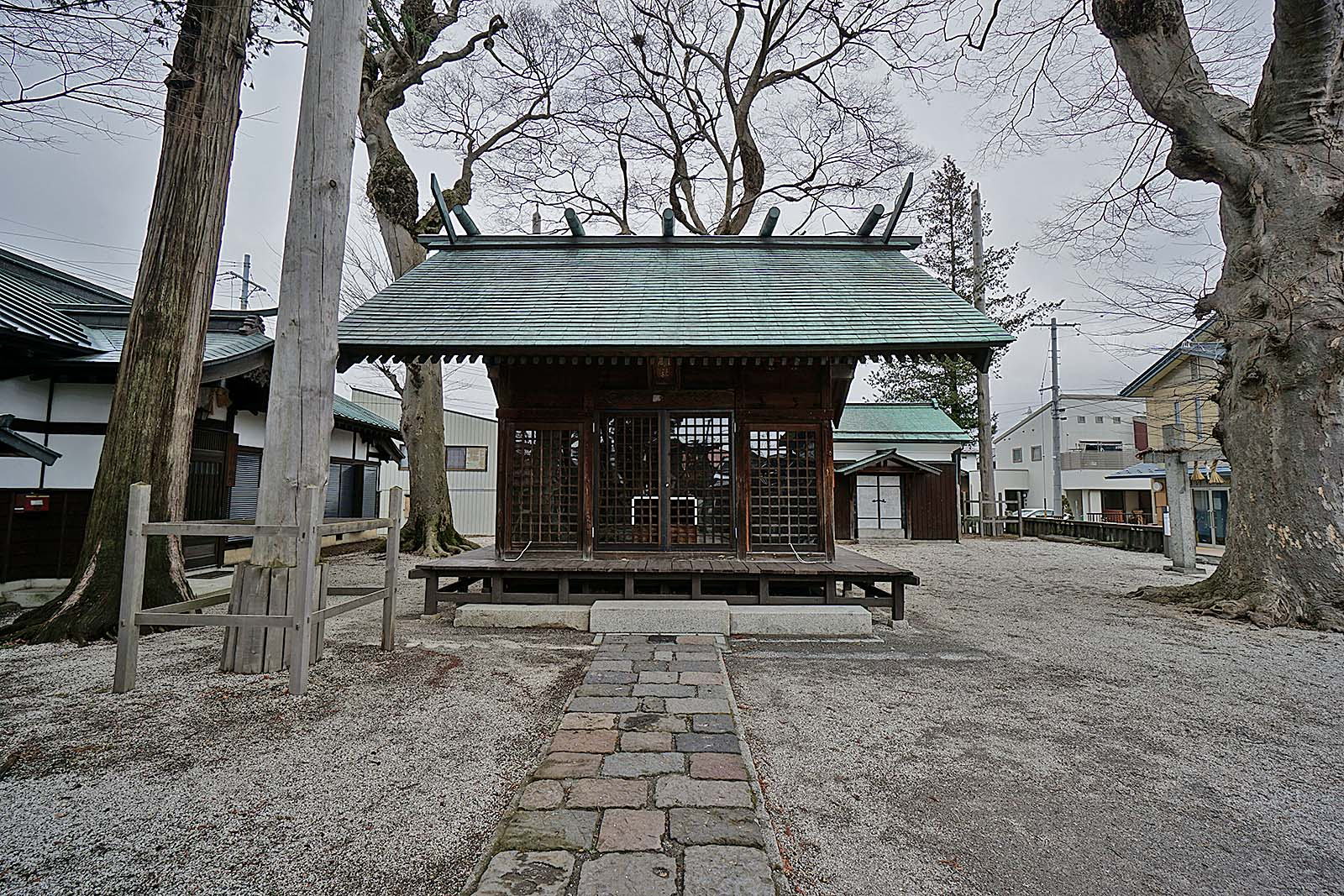 Tatsuya-Sukura Shrine , 達屋酢蔵神社